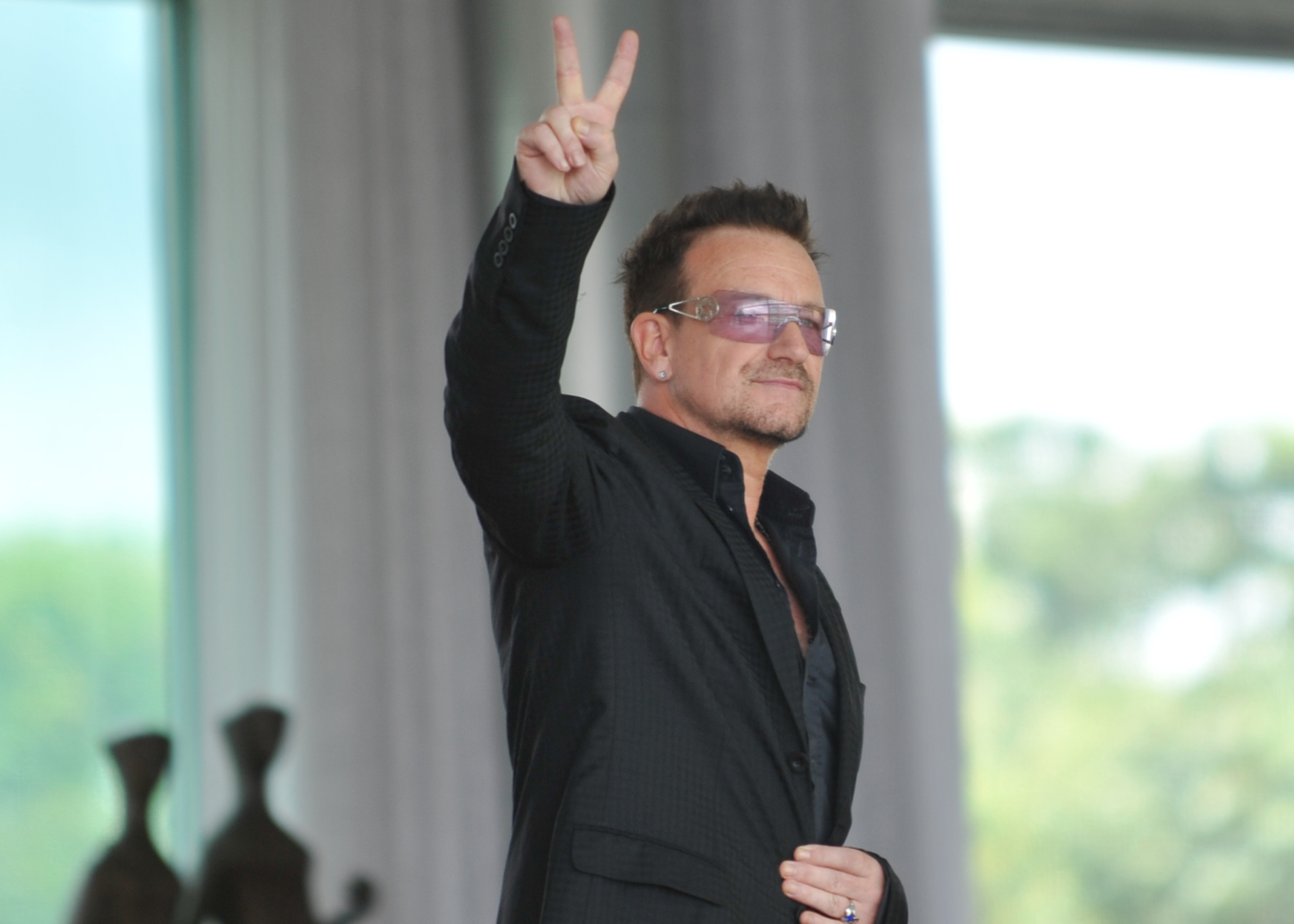 Brasília - Presidenta Dilma Rousseff recebe o líder e vocalista da banda irlandesa U2 e co-fundador da Fundação ONE, Bono Vox